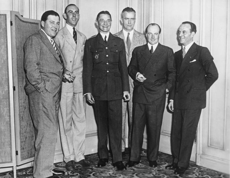 Die besten Flieger der Welt in Amerika In Cleveland findet in den nächsten Tagen ein grosser internationaler Flugwettbewerb, verbunden mit einem Luftrennen statt, zu dem aus der ganzen Welt die besten Piloten zusammengekommen sind. UBz: eine Gruppe der hervorragendsten Flieger in New York im Carlton-Hotel, wo sie offiziell begrüsst wurden. v.l.n.r.: Kapitän W. Orlinksi, Polen; Flight-Commander R. Atcherly, England; Major A. Kubita, Tschechoslowakei; Leutnant A. Williams, U.S., Major E. Udet, Deutschland und Oberstleutnant Mario De Bernardi, Italien.